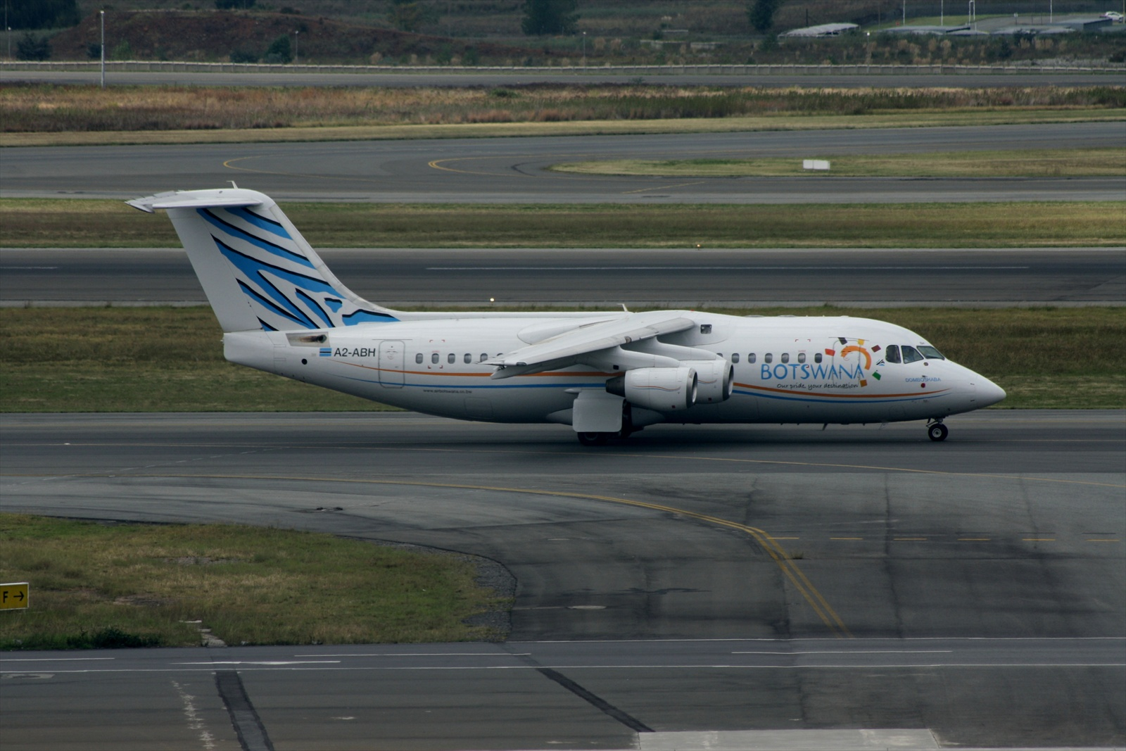 Air Botswana Bae Avro RJ85 A2-ABH